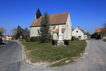 église et monument aux morts de Roinvilliers